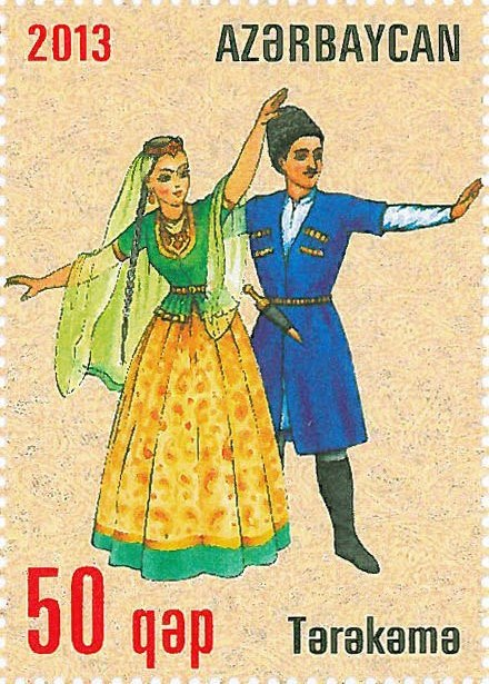 N 1089 - 50 qapik. There are pictured Azerbaijan folk dance "Terekeme" on the stamp.